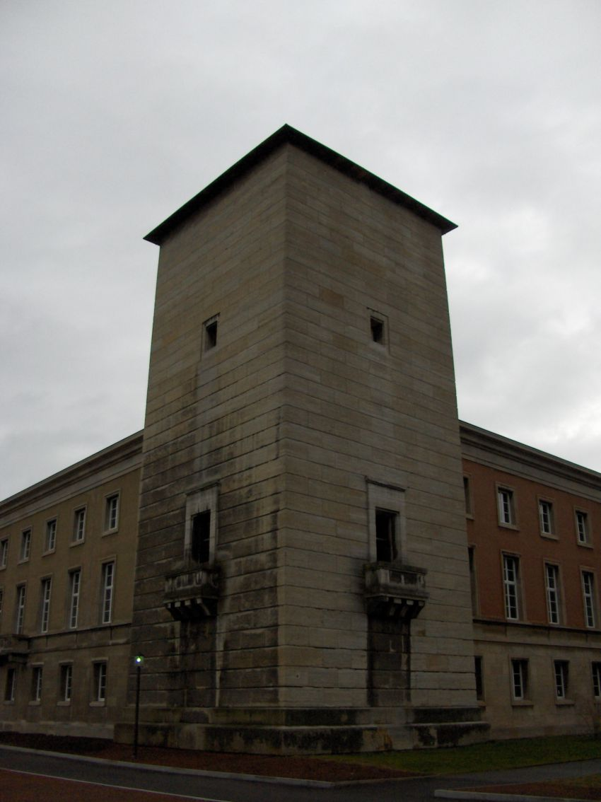 Gauforum Weimar Februar 2006